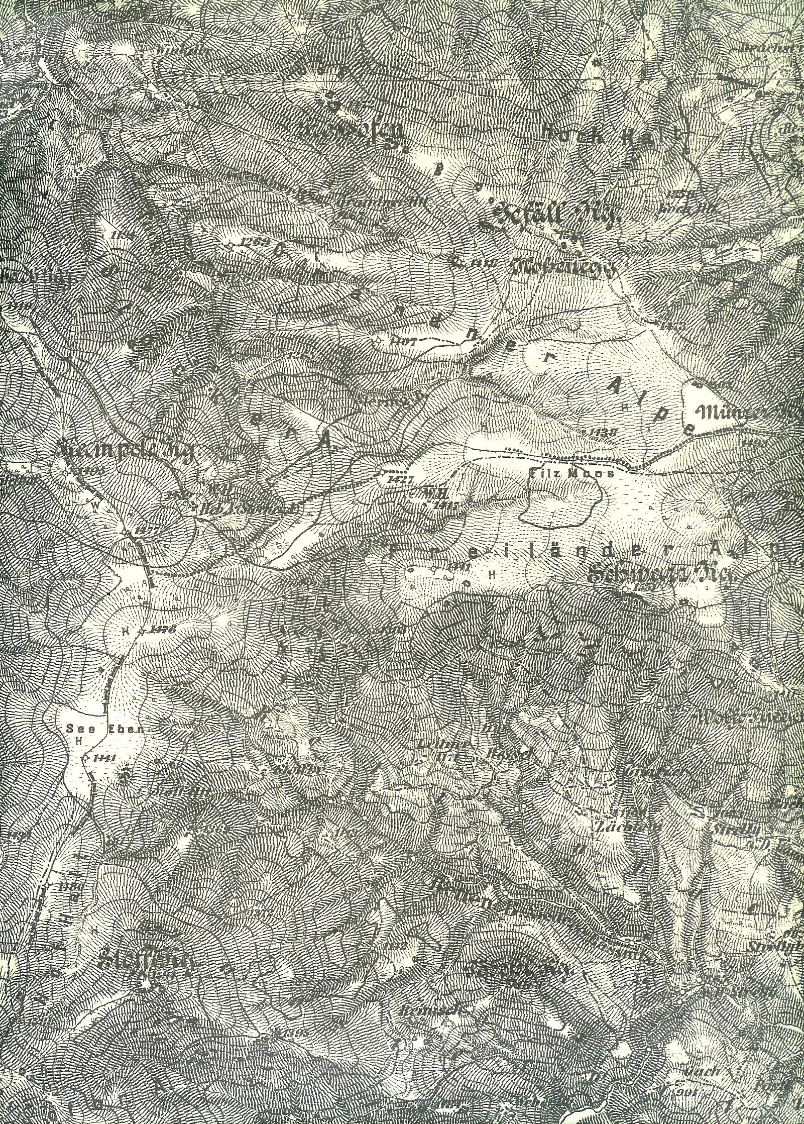 Landkarte 1:25000 Messtischblatt Hebalm ca 1890